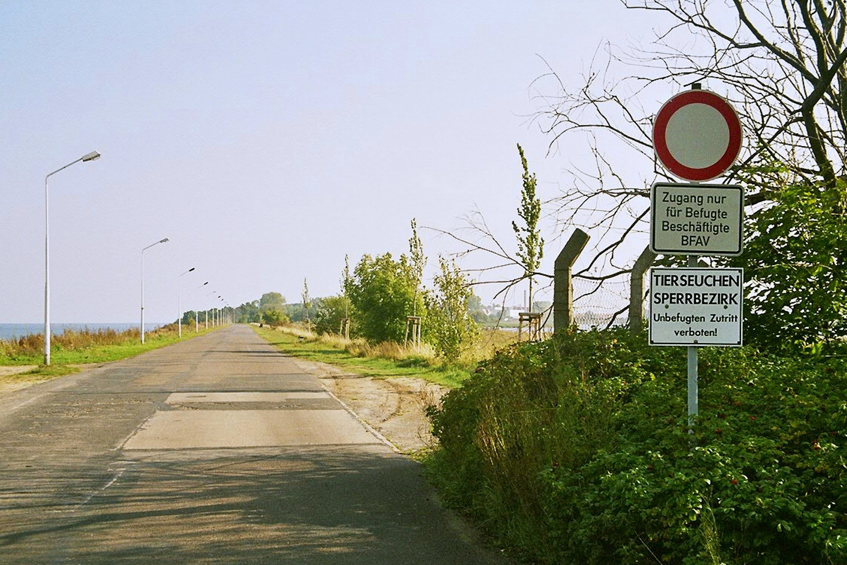 Source: made by WikiTour 2005 Description: (de:) Blick auf die Insel Riems, Zugang zum Tierseuchensperrbezirk am Damm Description: (fr:) Vue sur l'île de Riems, accès à la zone d'accès restreint aux maladies animales